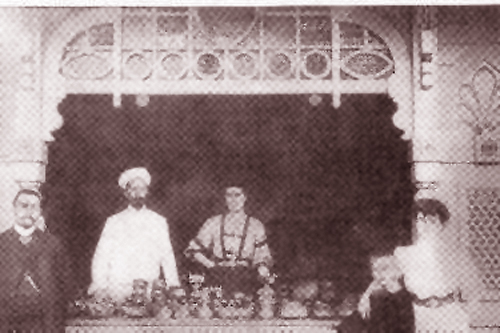 Vaffelbageriet i Tivoli, Anno 1908